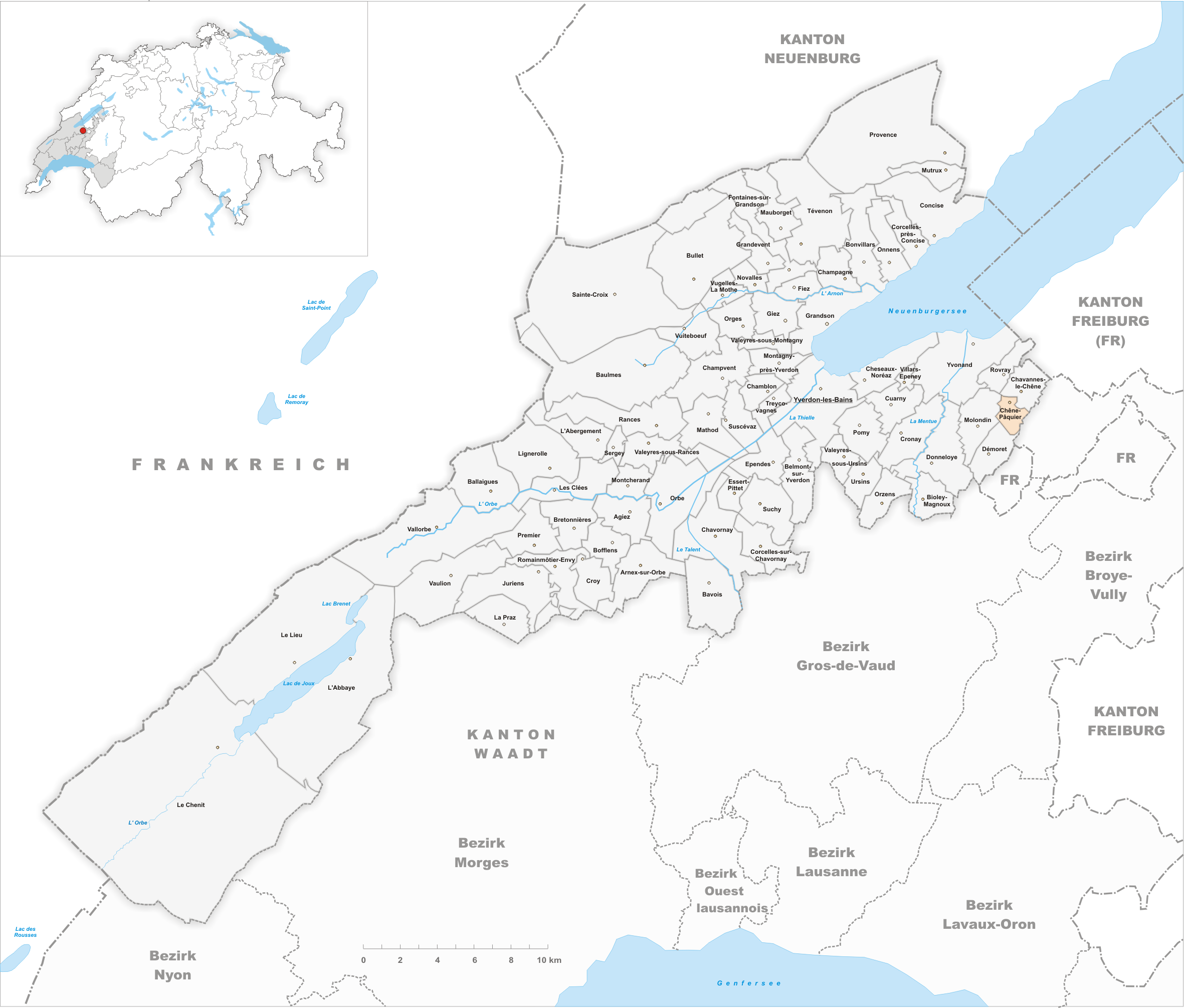 Municipality Chêne-Pâquier